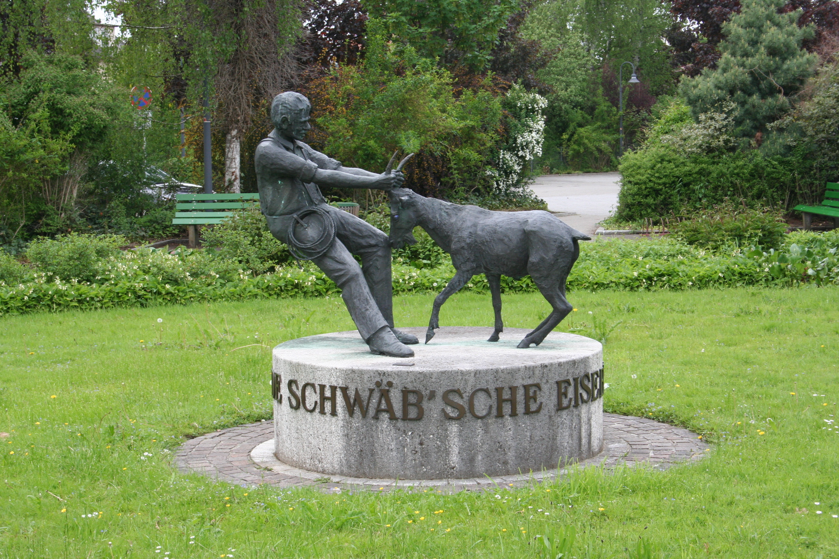 Skulptur "De Schwäb'sche Eisenbahne" in Meckenbeuren von Ingo Koblischek aus Friedrichshafen, 1986.